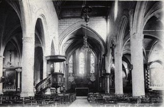 L'intérieur de l'église Saint-Denys en 1910, un an avant sa fermeture pour vétusté